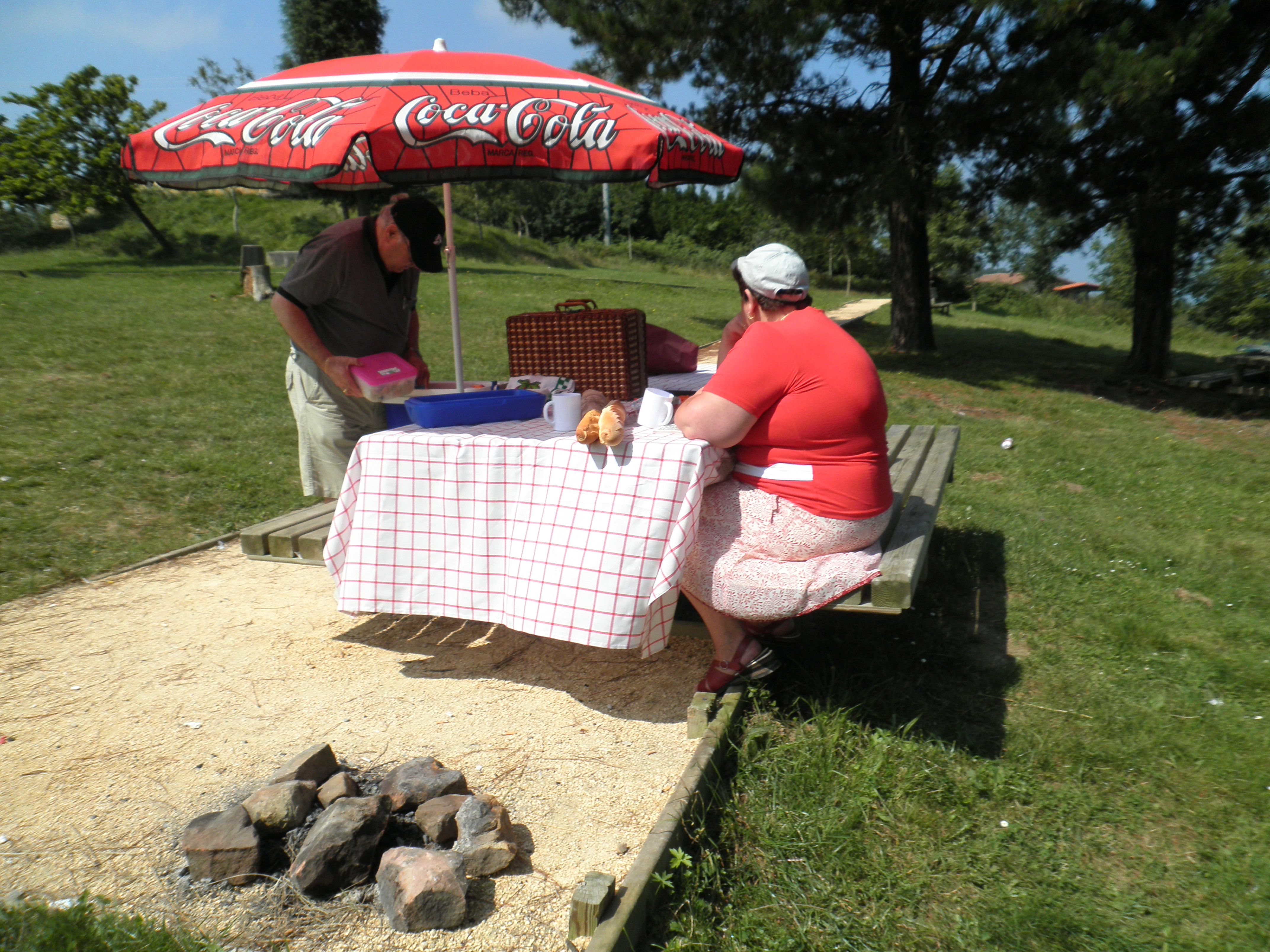 Picnica Orioko Luzarbe atsedenlekuan.